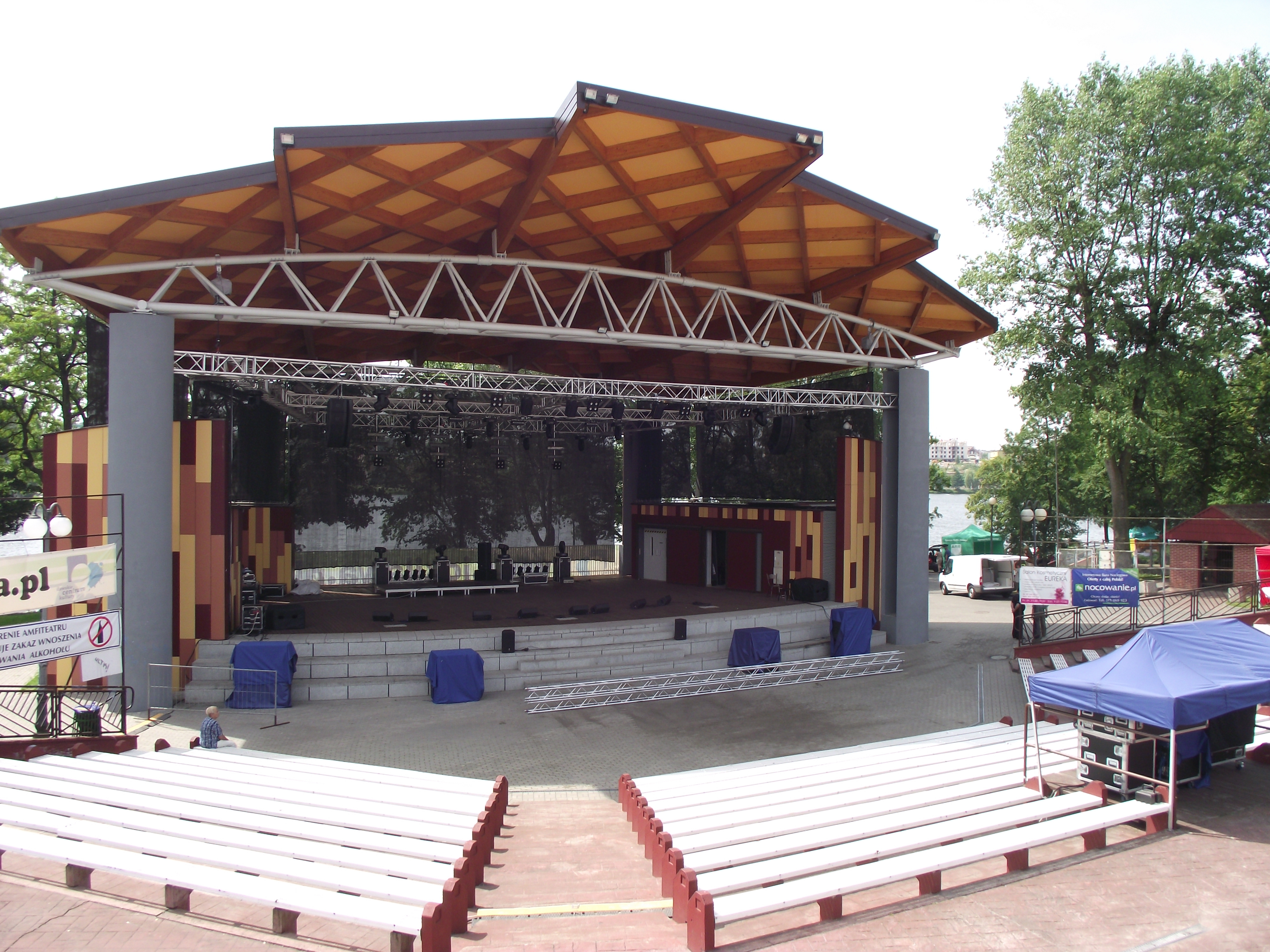 Iława - amfiteatr